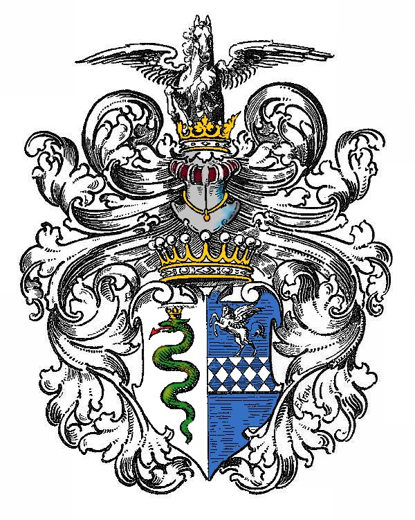 Wappen der Grafen Serényi von Kis-Serény, Grafen seit 1656